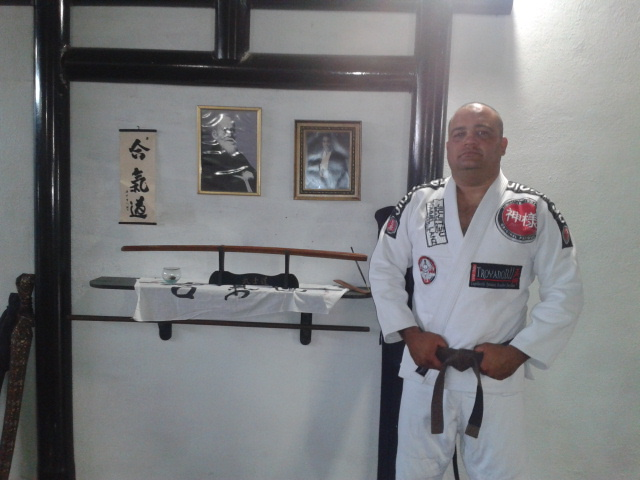 sensei